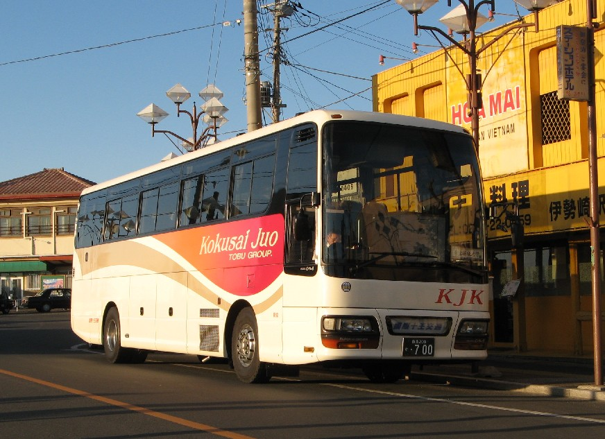 国際十王交通の貸切バス。群馬200か700。伊勢崎駅前そばの公道上で撮影。